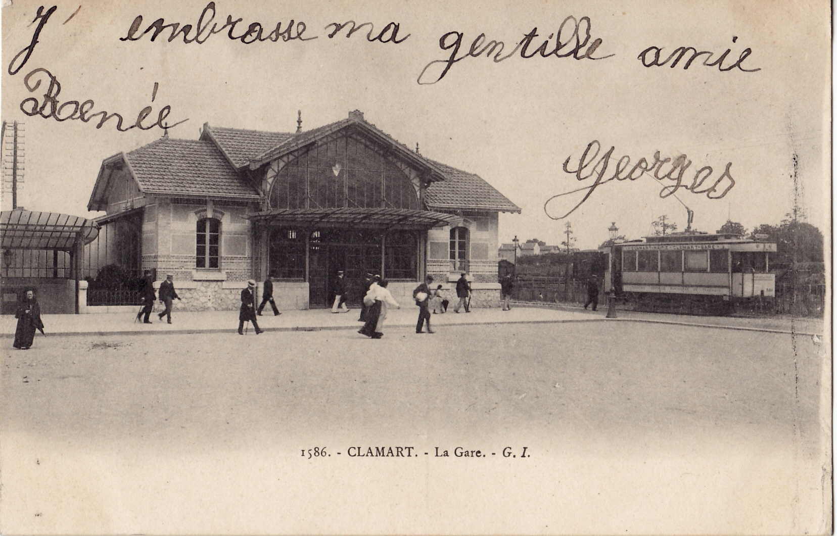 Carte postale ancienne éditée par GI, n°1586 : CLAMART - La Gare